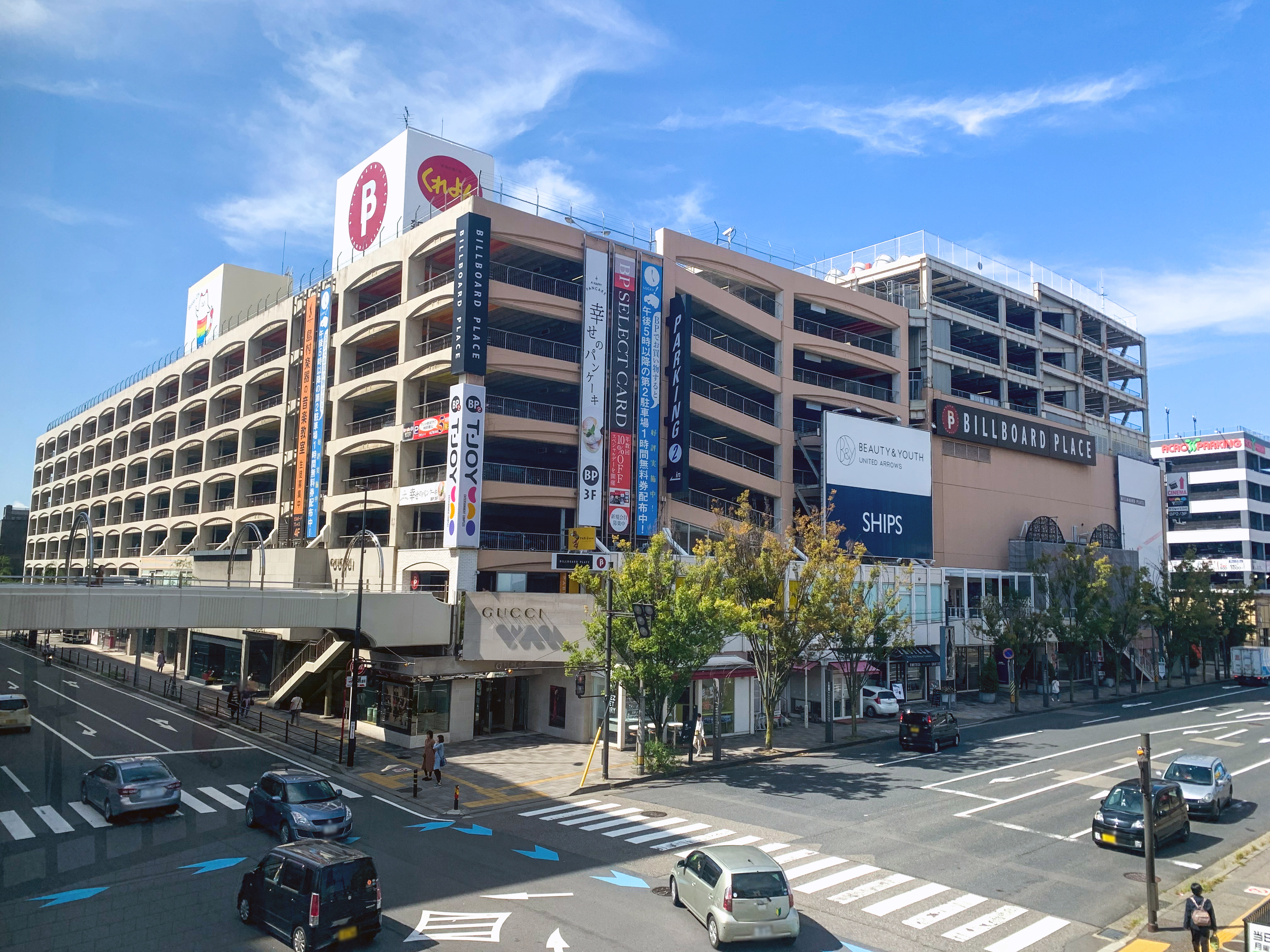 ビルボードプレイスが入る万代シテイ第二駐車場ビルA棟・B棟（2019年9月撮影）。